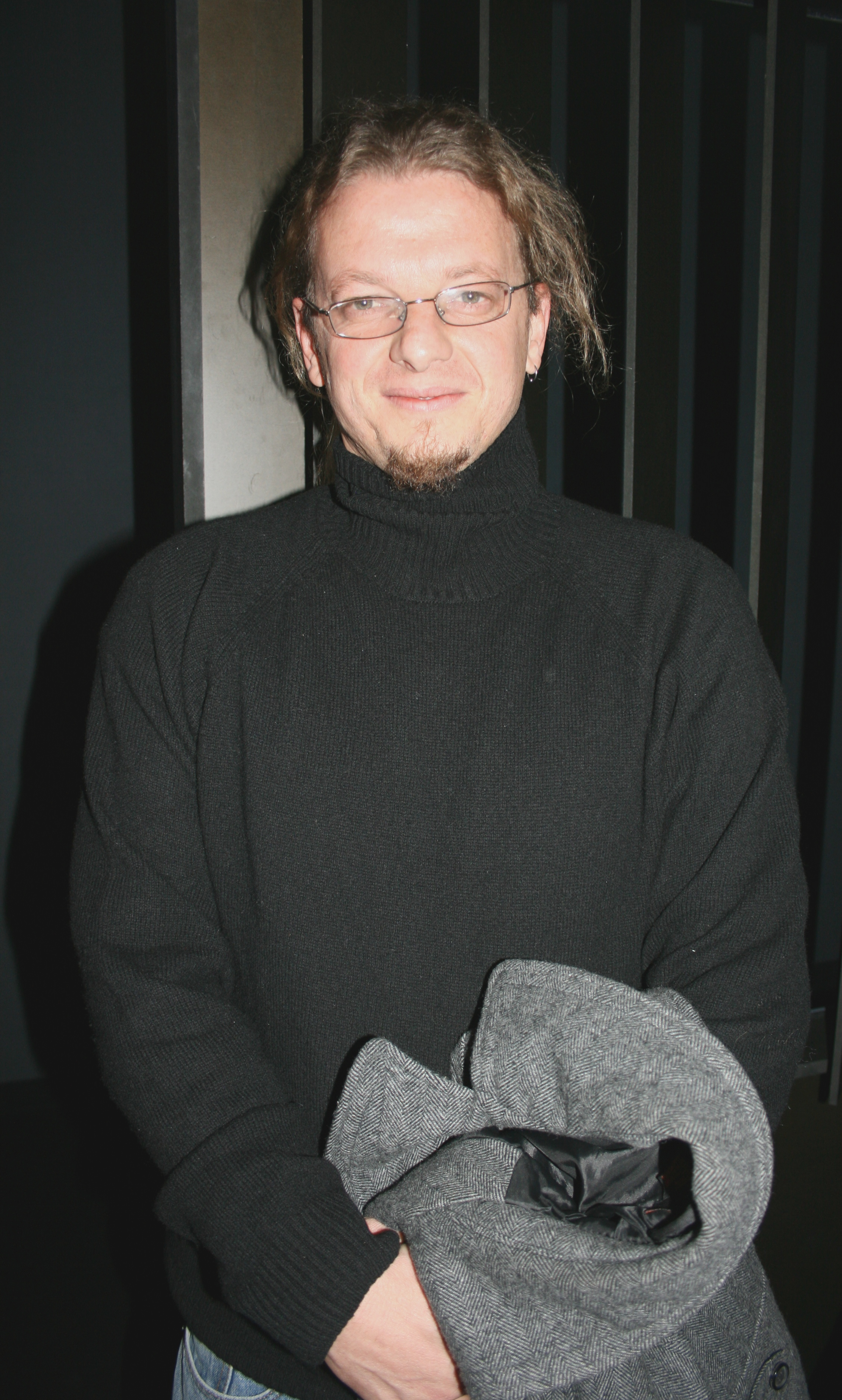 Rodrigo Plá à l'avant-première de La Zona, propriété privée diffusée à l'UGC Ciné Cité La Défense, à Puteaux.